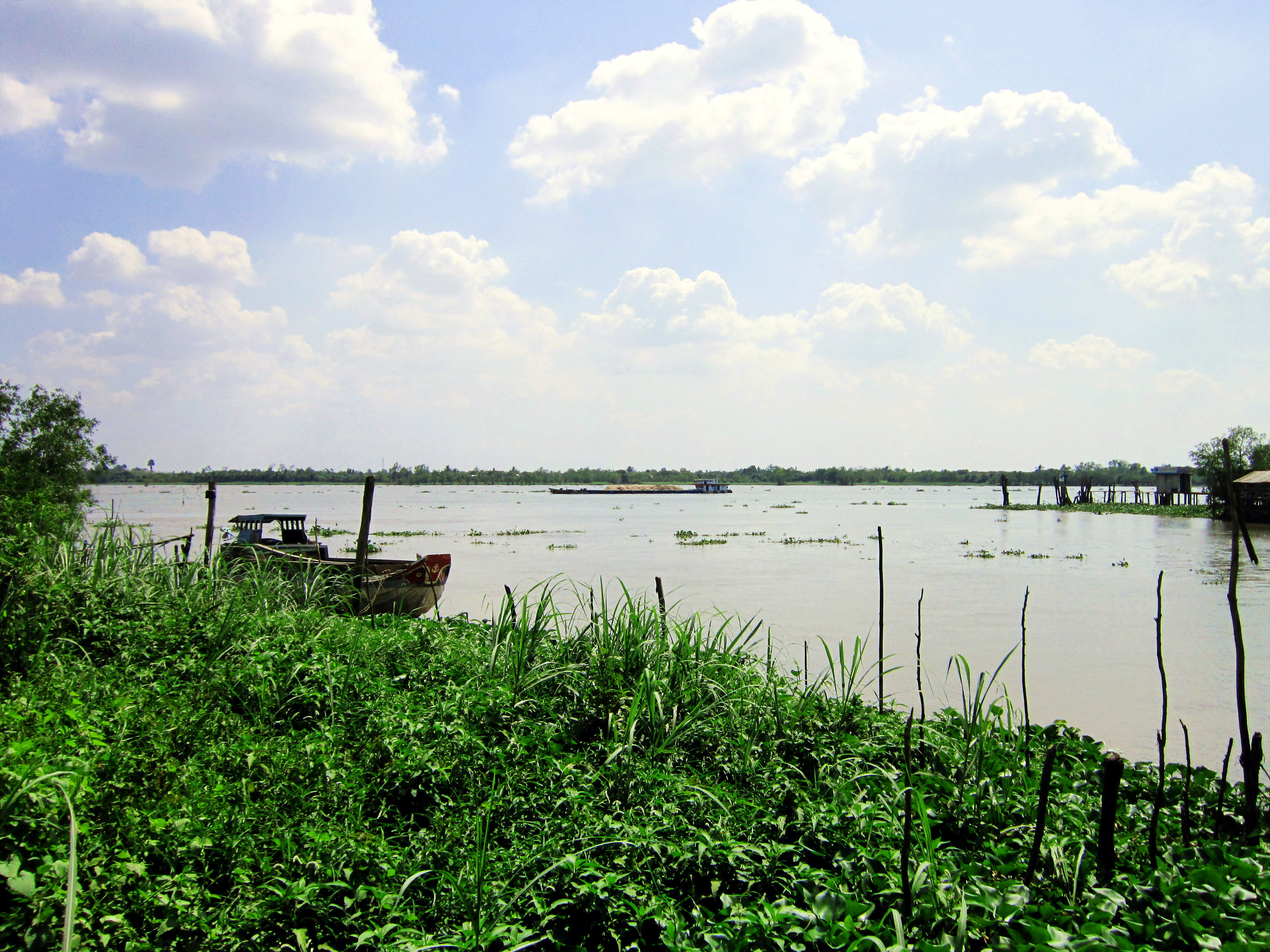 Vàm Trà Lọt thuộc xã Hòa Khánh, huyện Cái Bè, tỉnh Tiền Giang, Việt Nam.